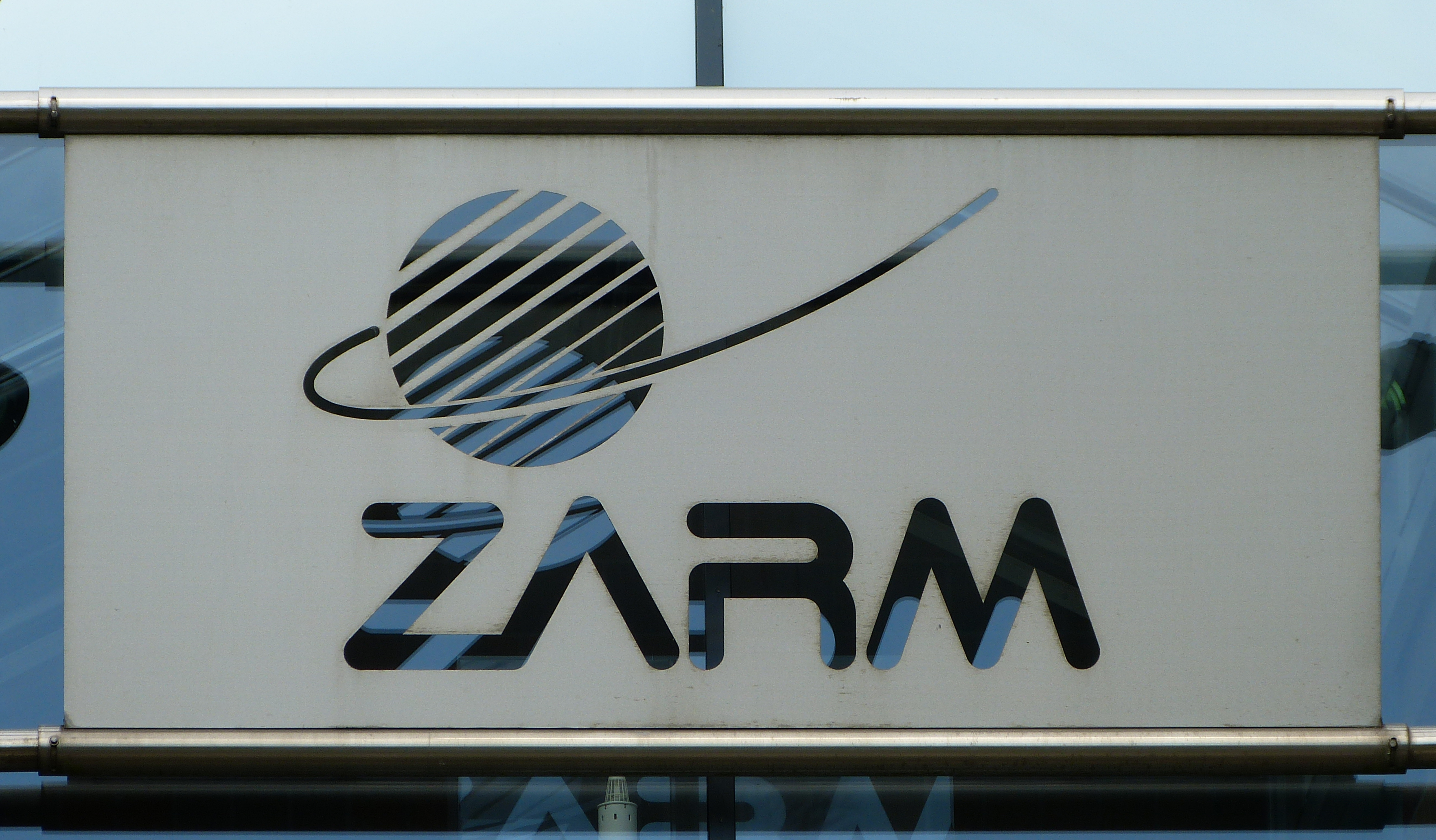 ZARM-Logo über dem Haupteingang des Bremer Fallturms